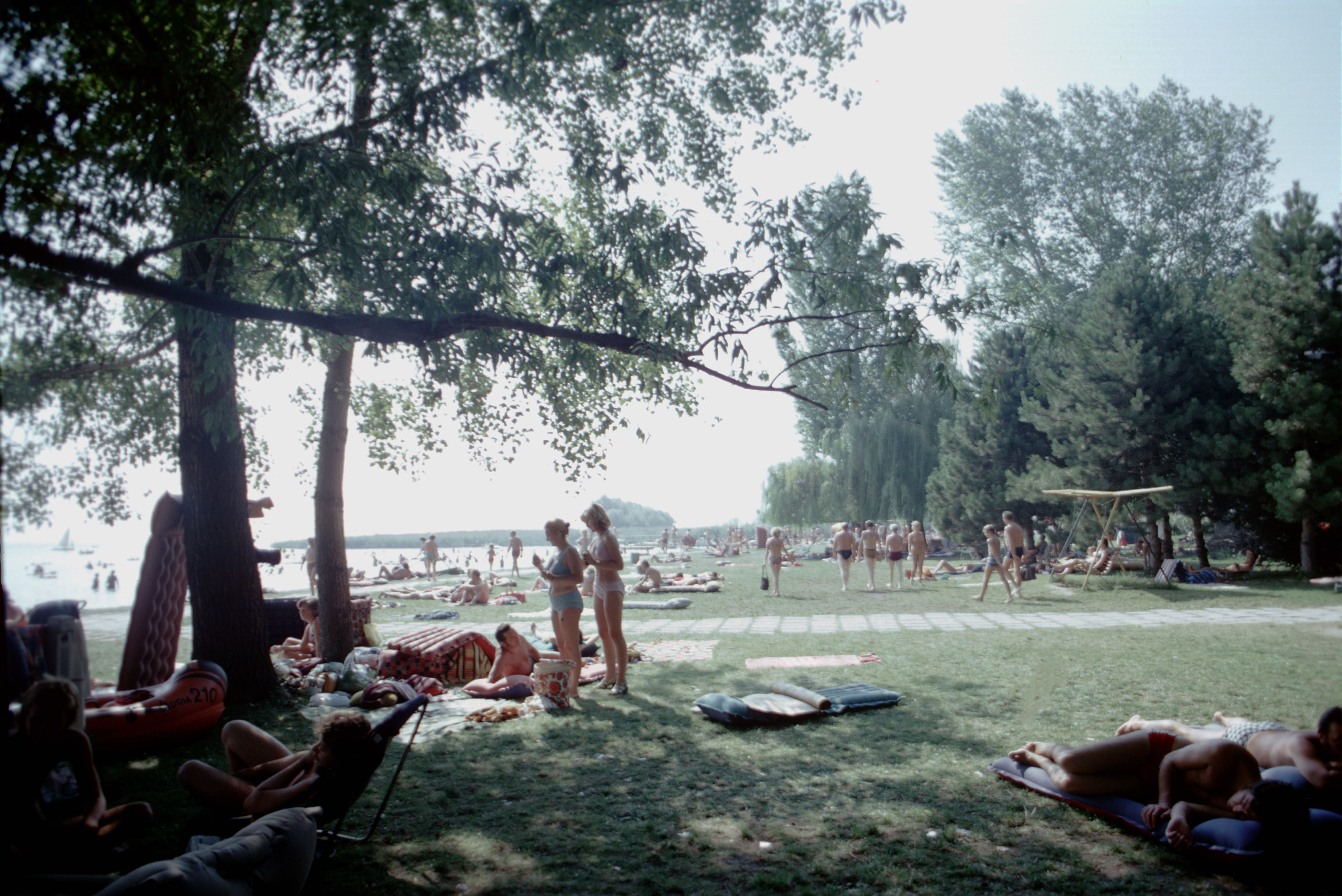 La plage de Club Tihany à l’extrémité de la presqu’île de Tihany (en face de Szántód sur la rive sud). Dimanche 18 août 1974. Tihany, (presqu’île de Tihany), comitat de Veszprém, Hongrie.